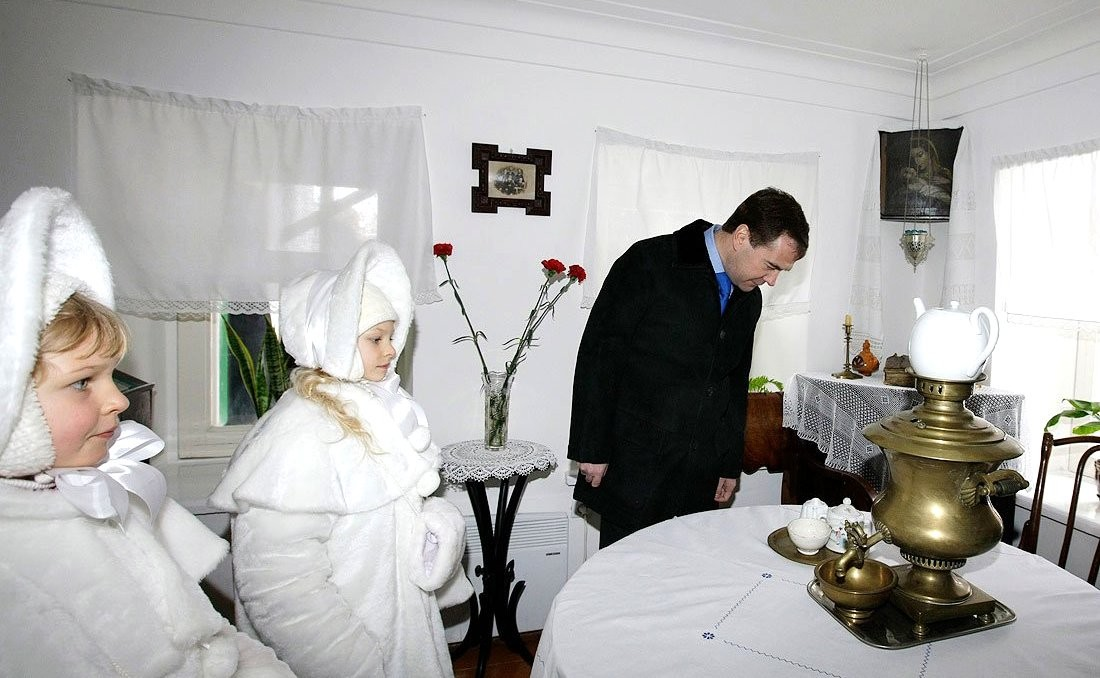 Празднование 150-летия со дня рождения Чехова